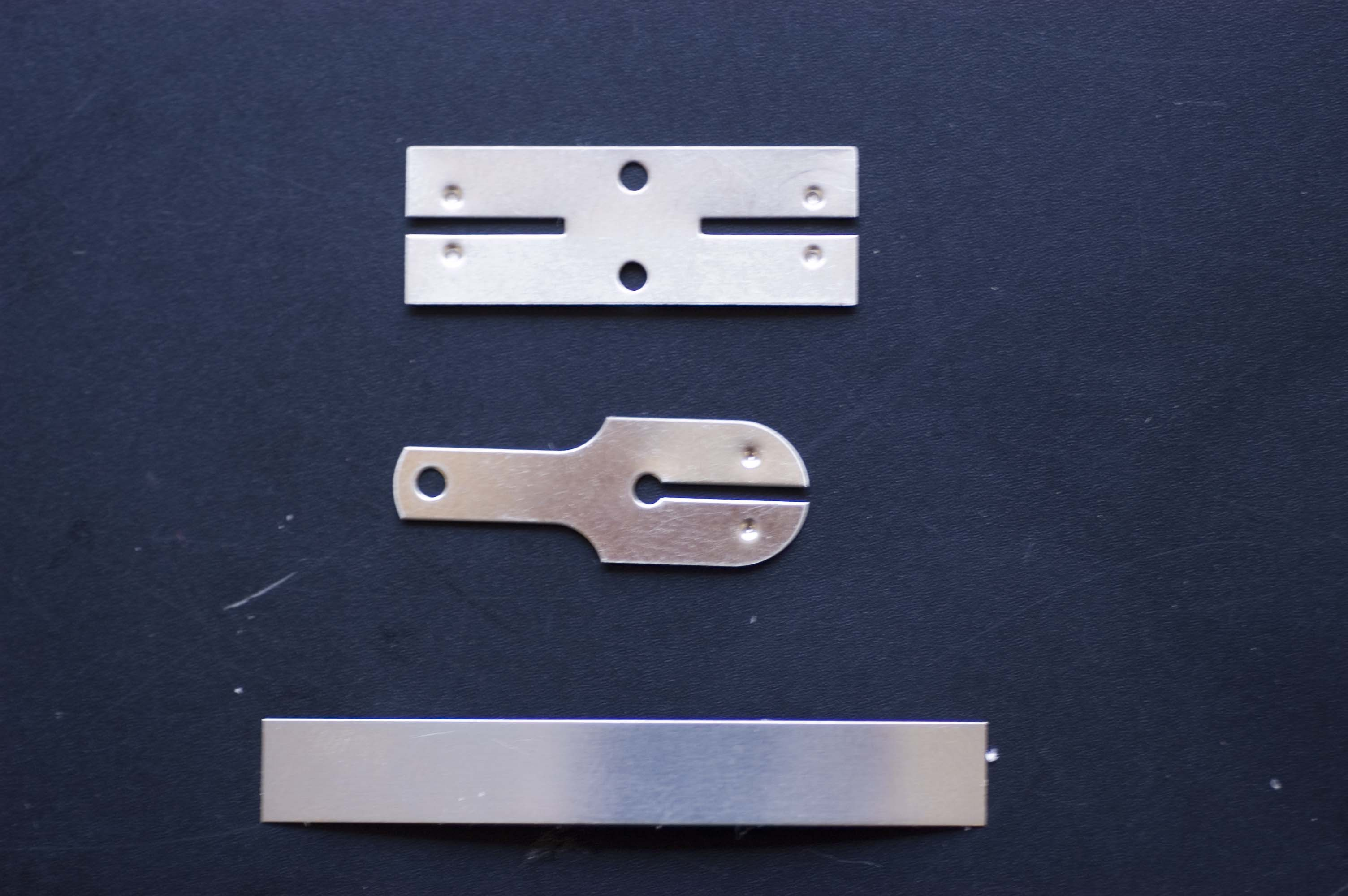 H-Verbinder, Y-Ableiter und Streifenverbinder-Ableiter